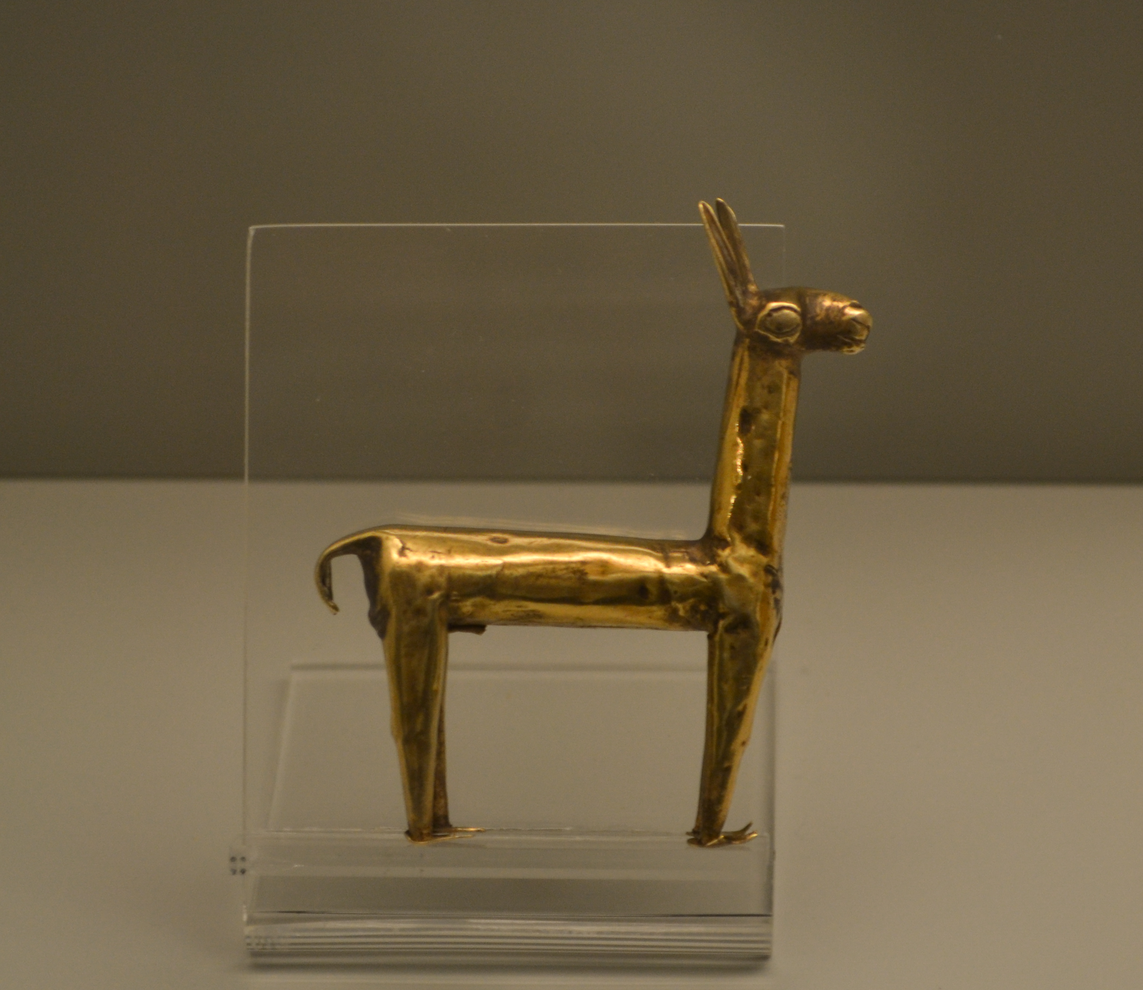 Figura inca de oro que representa una llama. 1400-1533 d. C. Altura : 6,10 cm; anchura: 1 cm; profundidad: 5,70 cm; peso: 8,94 g. Procedencia: Departamento de Cuzco, Perú. Nº inv. 07399. Museo de América.